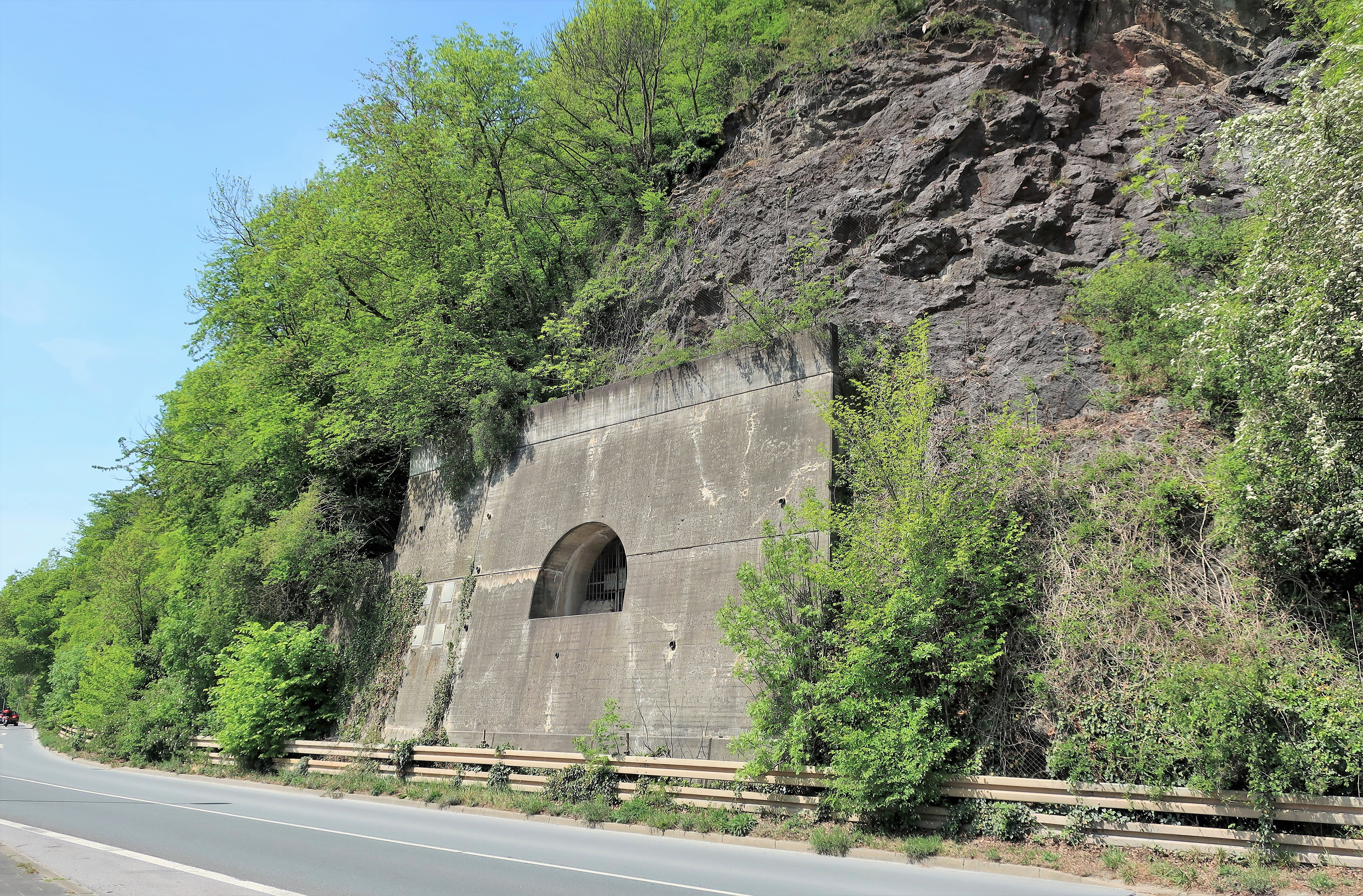 Oeger Höhle am Oeger Stein in Hagen-Hohenlimburg, Mühlenbergstraße. Seit dem 19. Jahrhundert sind aus der Oeger Höhle zahlreiche Knochenfunde eiszeitlicher Tiere bekannt. Die im Jahre 1932 bisher einzige größere Grabung förderte die Geweihreste von zahlreichen Rentieren sowie Knochen von z.B. Höhlenbär, Höhlenhyäne, Mammut, Riesenhirsch und Wollnashorn zu Tage. Einige Funde deuten auch auf die Nutzung steinzeitlicher Menschen hin, etwa Steinwerkzeuge, Fragmente von Gefäßen aus der Jungsteinzeit und Keramikreste aus den vorrömischen Metallzeiten. Mehrere Untersuchungen des heute gesicherten und überwachten Höhlenraums durch Archäologen seit 2004 ergaben, dass trotz der wenig systematischen Untersuchung 1932 und weiteren illegalen Grabungen sowie der im Jahre 1976 zerstörerischen Verschließung des Eingangs durch eine Betonwand anscheinend immer noch ungestörte Sedimente vorhanden sind. Somit gibt es für diese wichtige Höhlenfundstelle eine Perspektive auf weitere Erforschung.